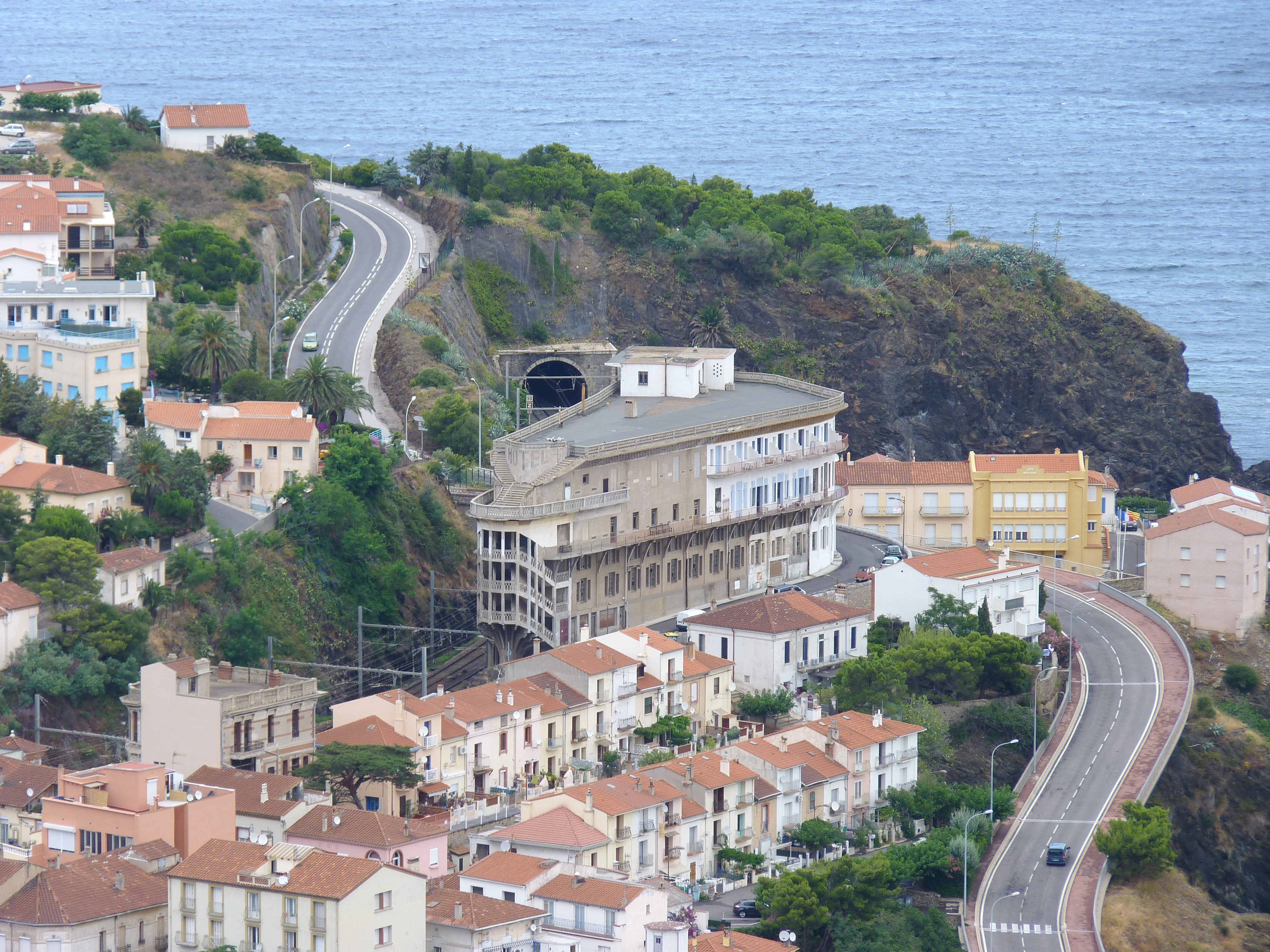 Hôtel Belvédère du Rayon Vert, Cerbère (Pyrénées-Orientales, Languedoc-Roussillon, France)